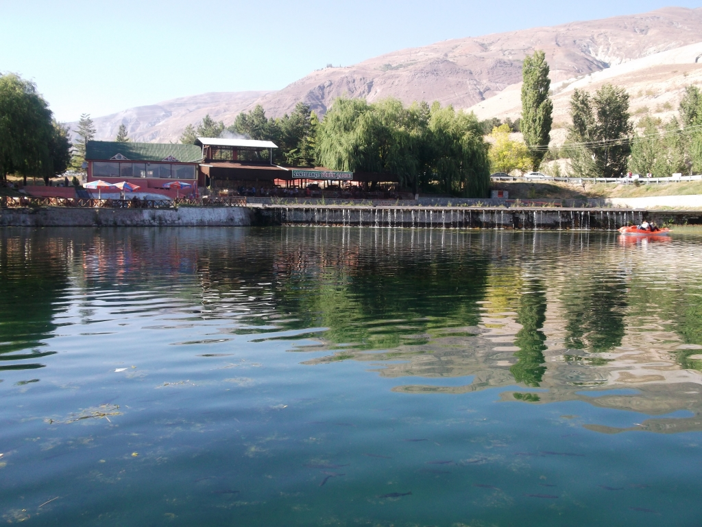 Ekşisu...